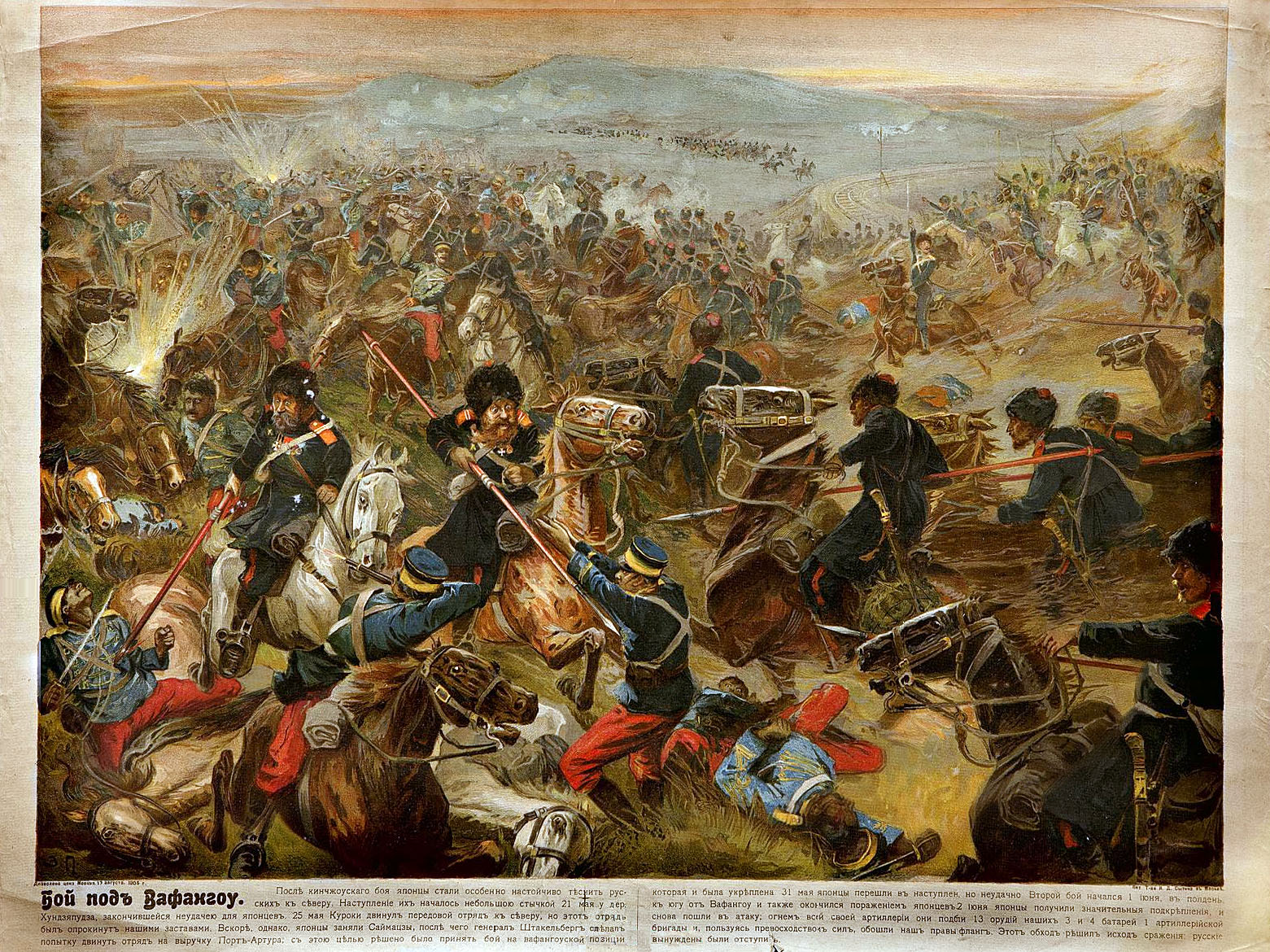 Это плакат «Бой под Вафангоу» сделан в Типолитографии Товарищества И.Д. Сытина в Москве в 1905 году. на плакате изображено сражение при Вафангоу, произошедшее 31 мая - 2 июня 1904 года между русскими и японскими войсками